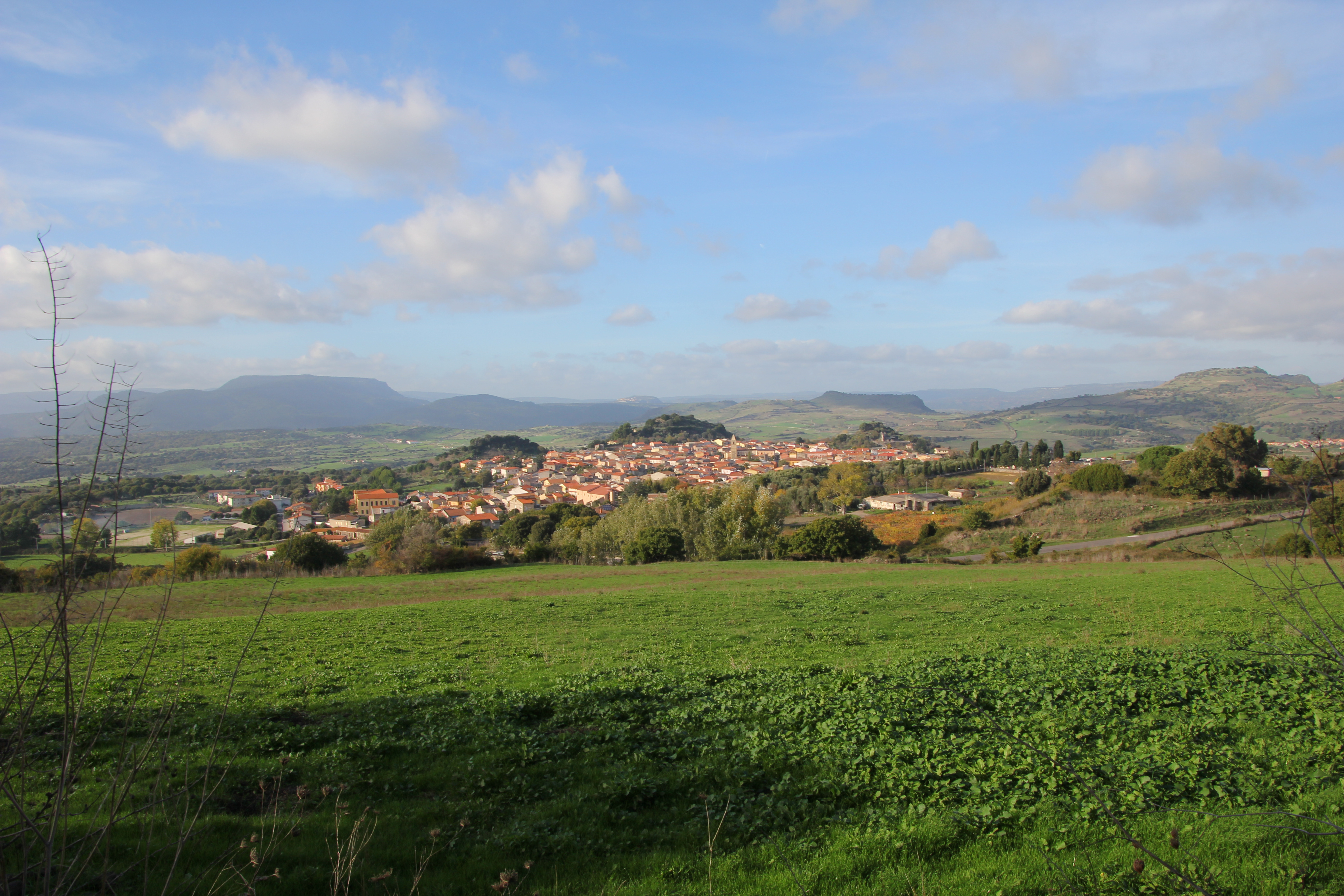 Panorama